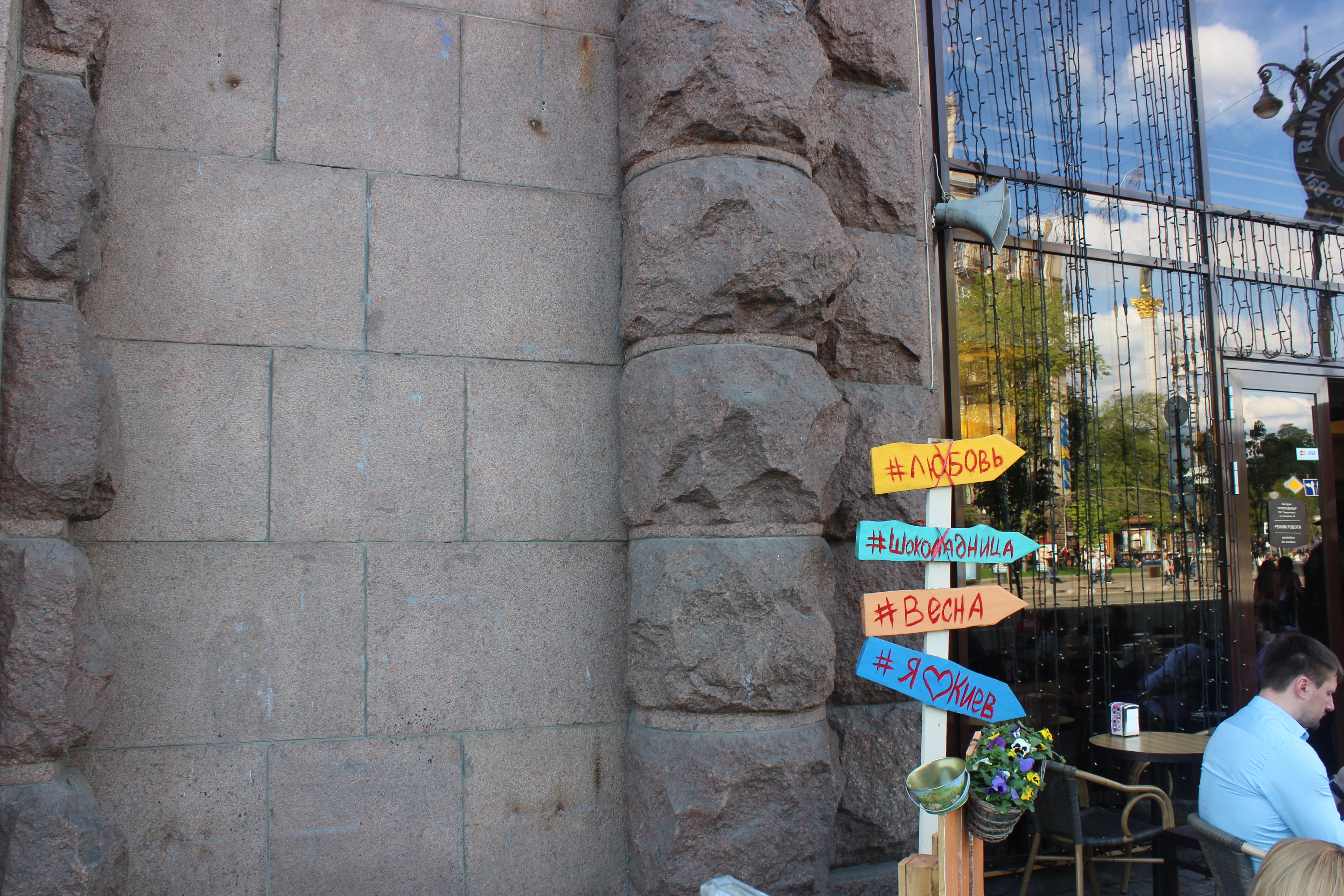 Вулиця Хрещатик, Київ, вул. Хрещатик